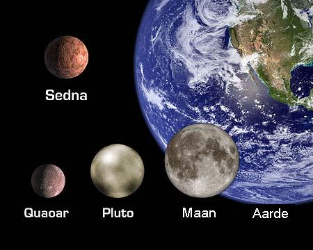 Afbeelding PIA05567 uit Nasa/JPL planetary photojournal. Meer informatie: Zie ook thumb|left